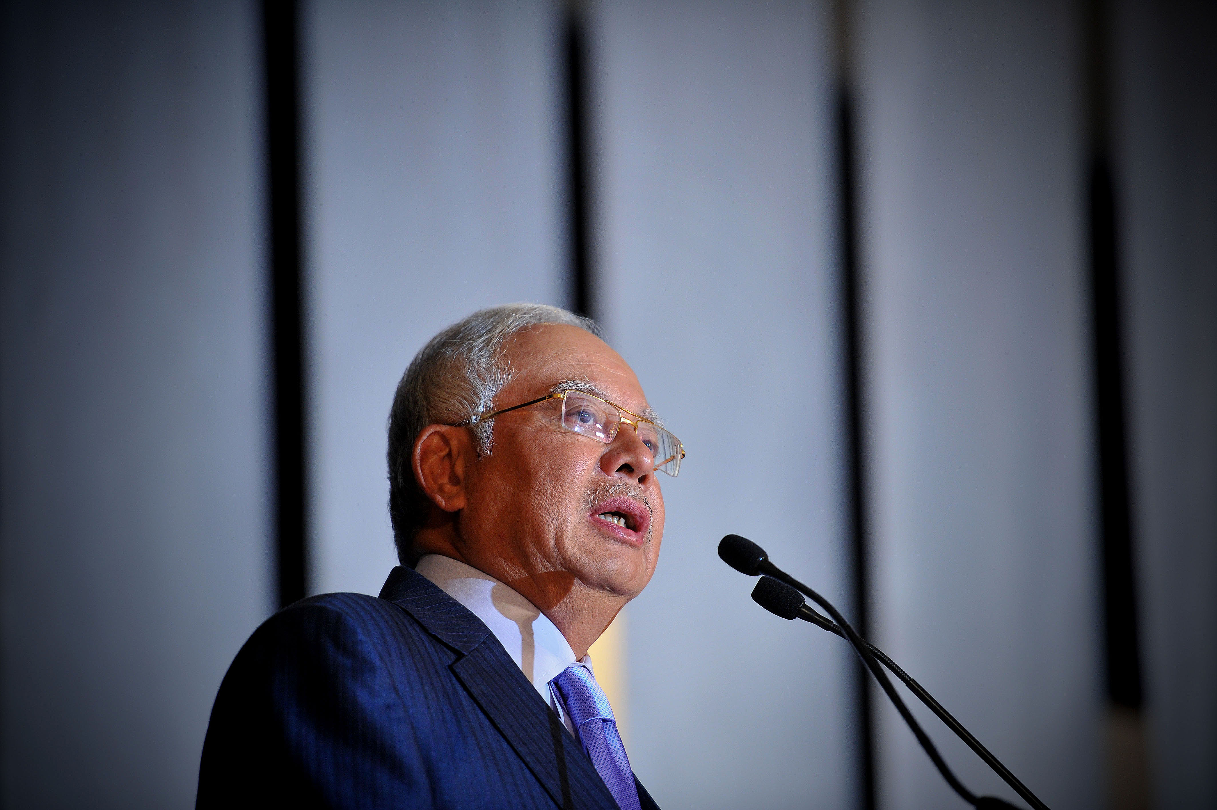 Prime Minister of Malaysia Datuk Seri Najib Tun Razak